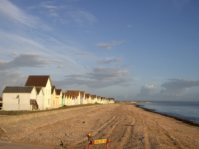 Les cabines au bord de la plage